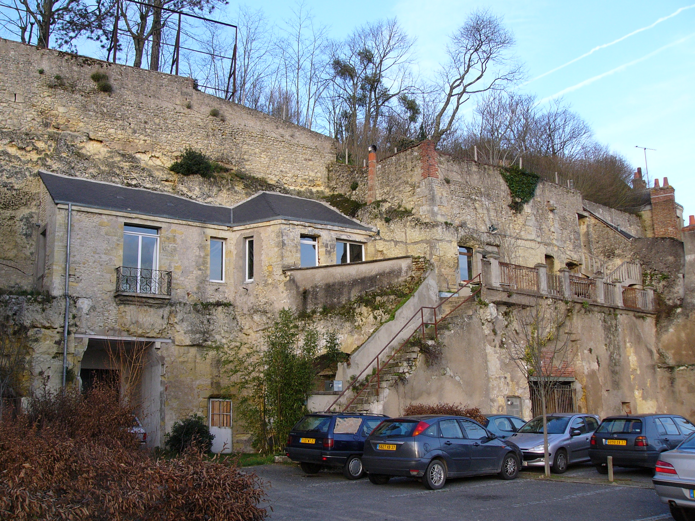 Vouvray (Indre-et-Loire, France) : maisons troglodytes